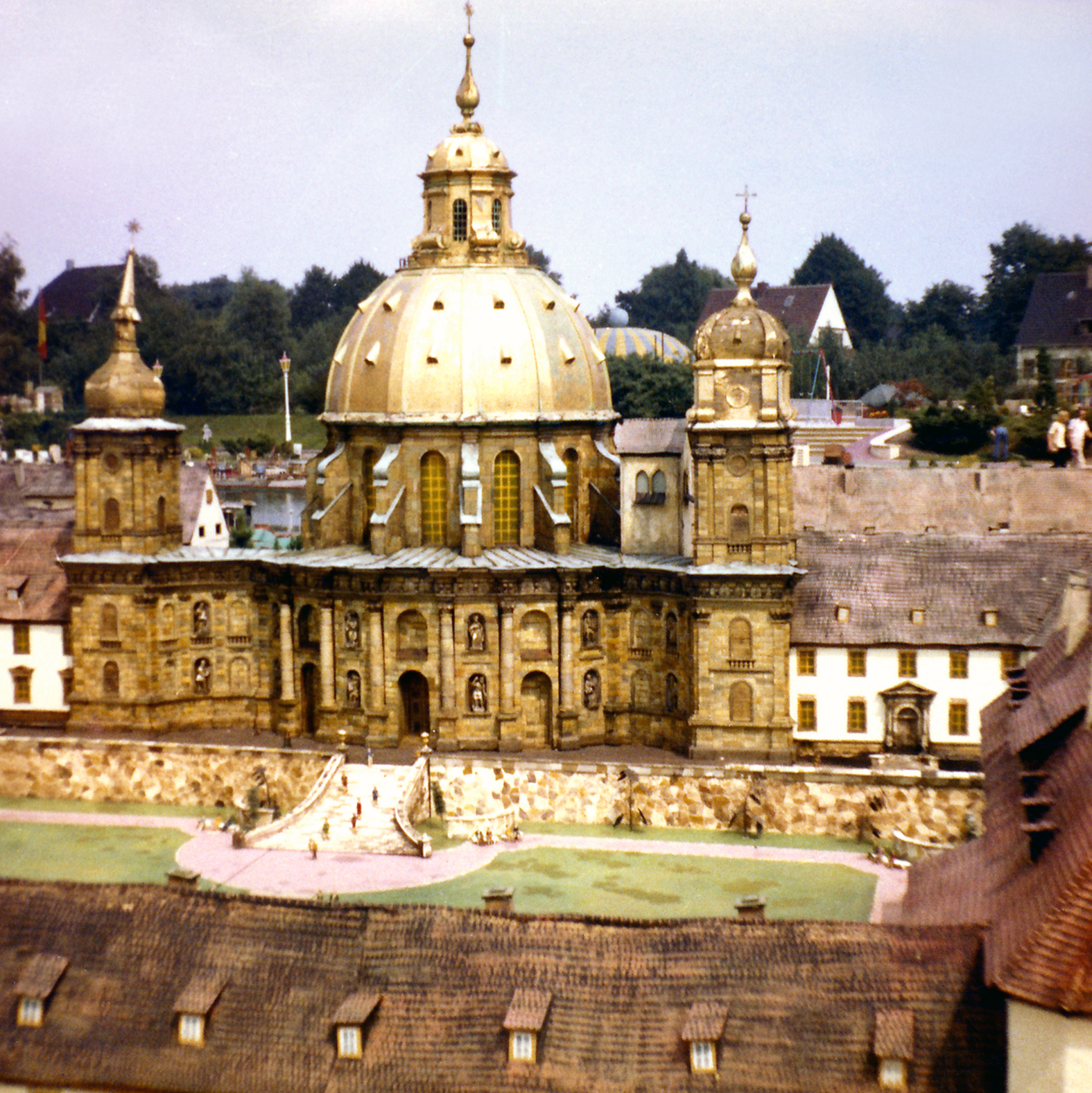 Miniatur vom Kloster Ettal im ehemaligen Miniaturpark Minidomm